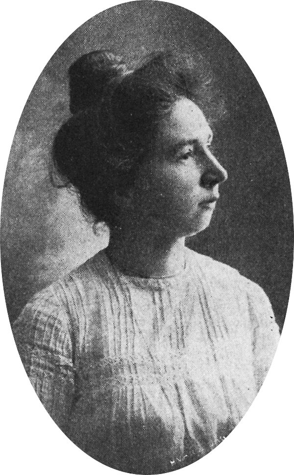 Ulla Linder (1873-1954)